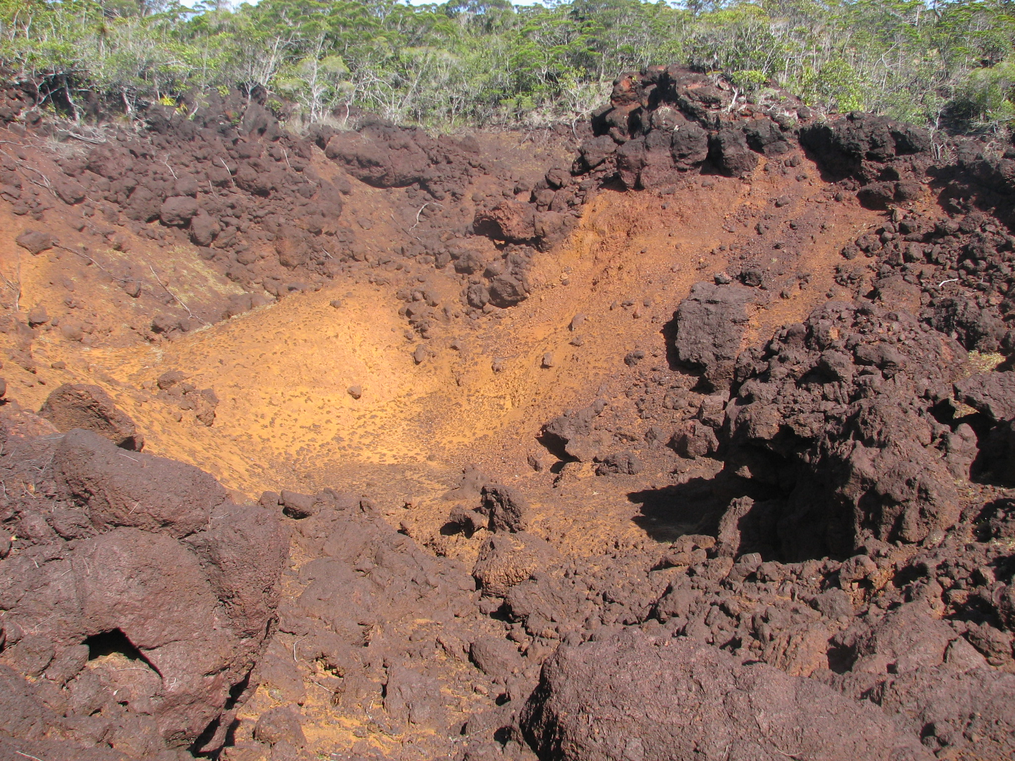 Cuirassements sur péridotite dans le Sud de la Nouvelle-Calédonie